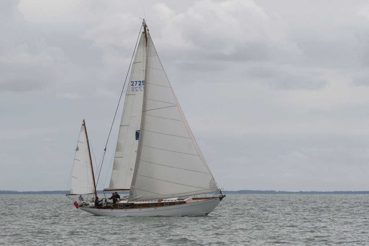 Rose Noire II dans la baie de la Rochelle